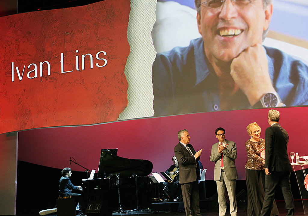 São Paulo (SP) | Ministério da Cultura celebra a Ordem do Mérito Cultural 2013. Na foto: Ivan Lins é homenageado 05.11.2013 Foto: Elisabete Alves